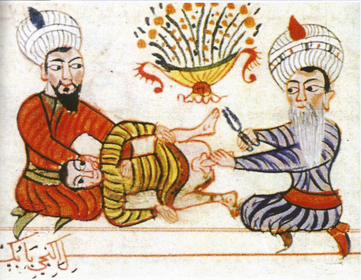 15. yüzyılda Sabuncuoğlu Şerefeddin tarafından yazılan Cerrahiyetü'l Haniyye'de yer alan sünnet sahnesi.